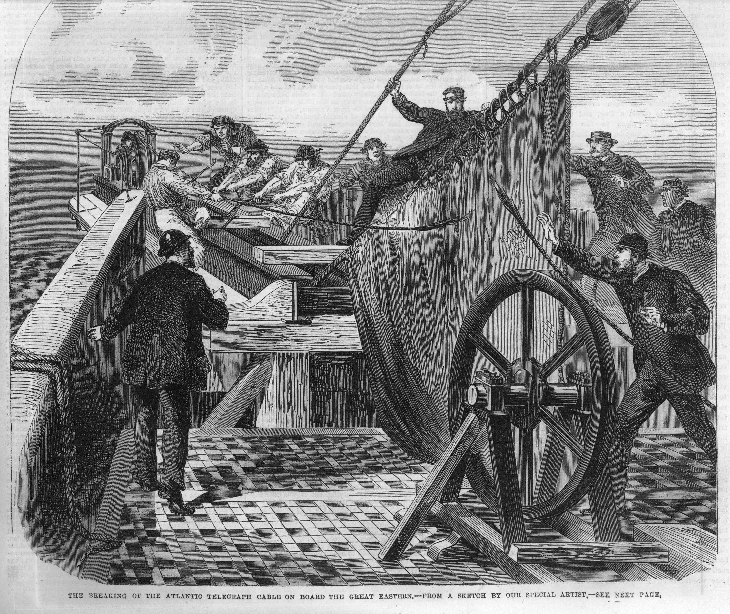 Reißen des Transatlantikkabels 1865 während der Verlegung durch die Great Eastern.